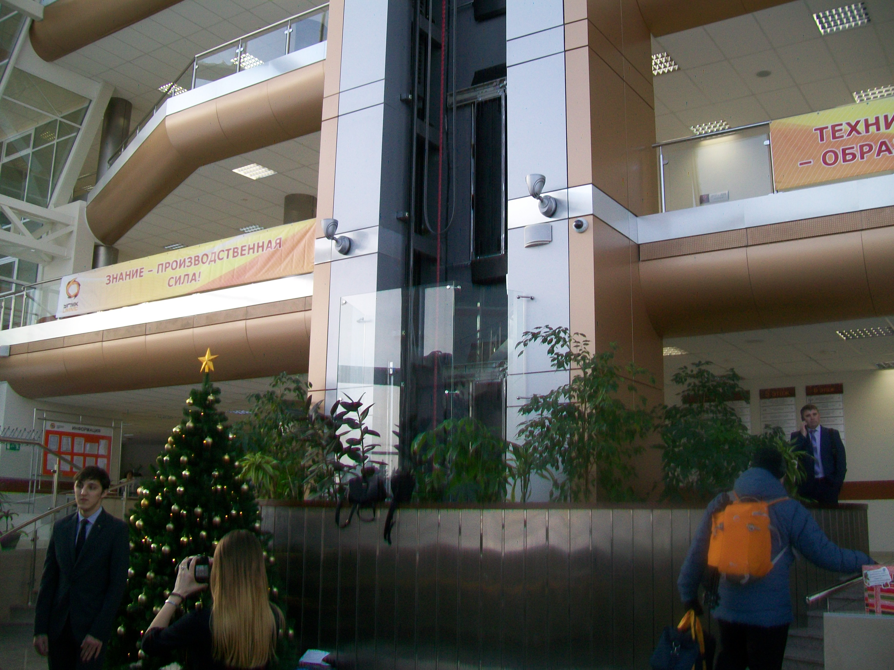 Вход в здание Технического университета УГМК. Верхняя Пышма. Декабрь 2016 года